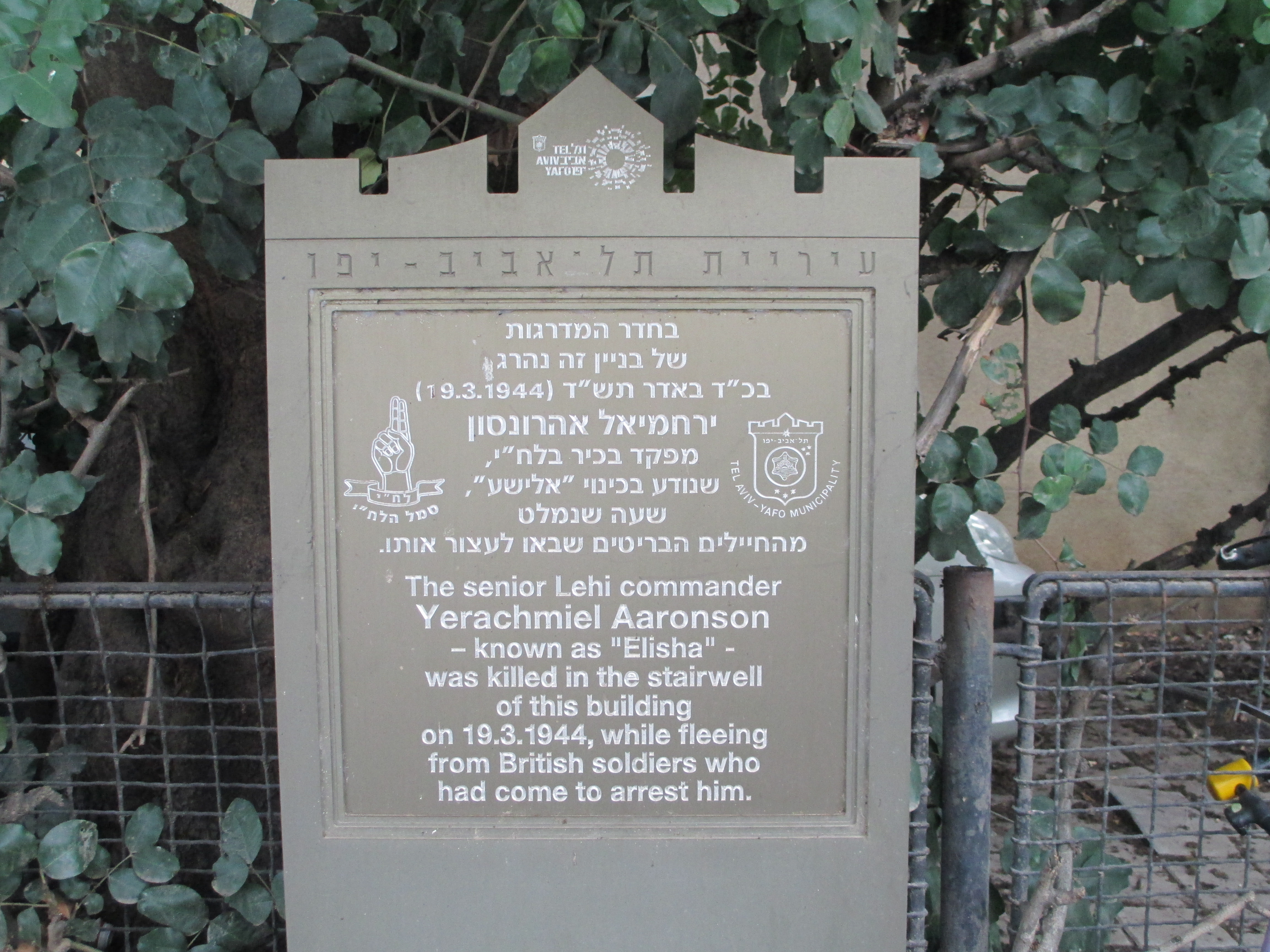 שלט זיכרון ללוחם לח"י "אלישע" ברחוב מאז"ה 33 בתל אביב